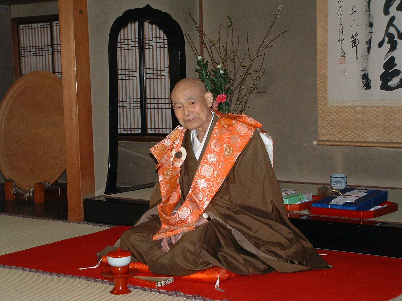 Nishikata Tansetzu Roshi als Kancho des Myoshinji in Kyoto 2004 Photograph by Gakuro